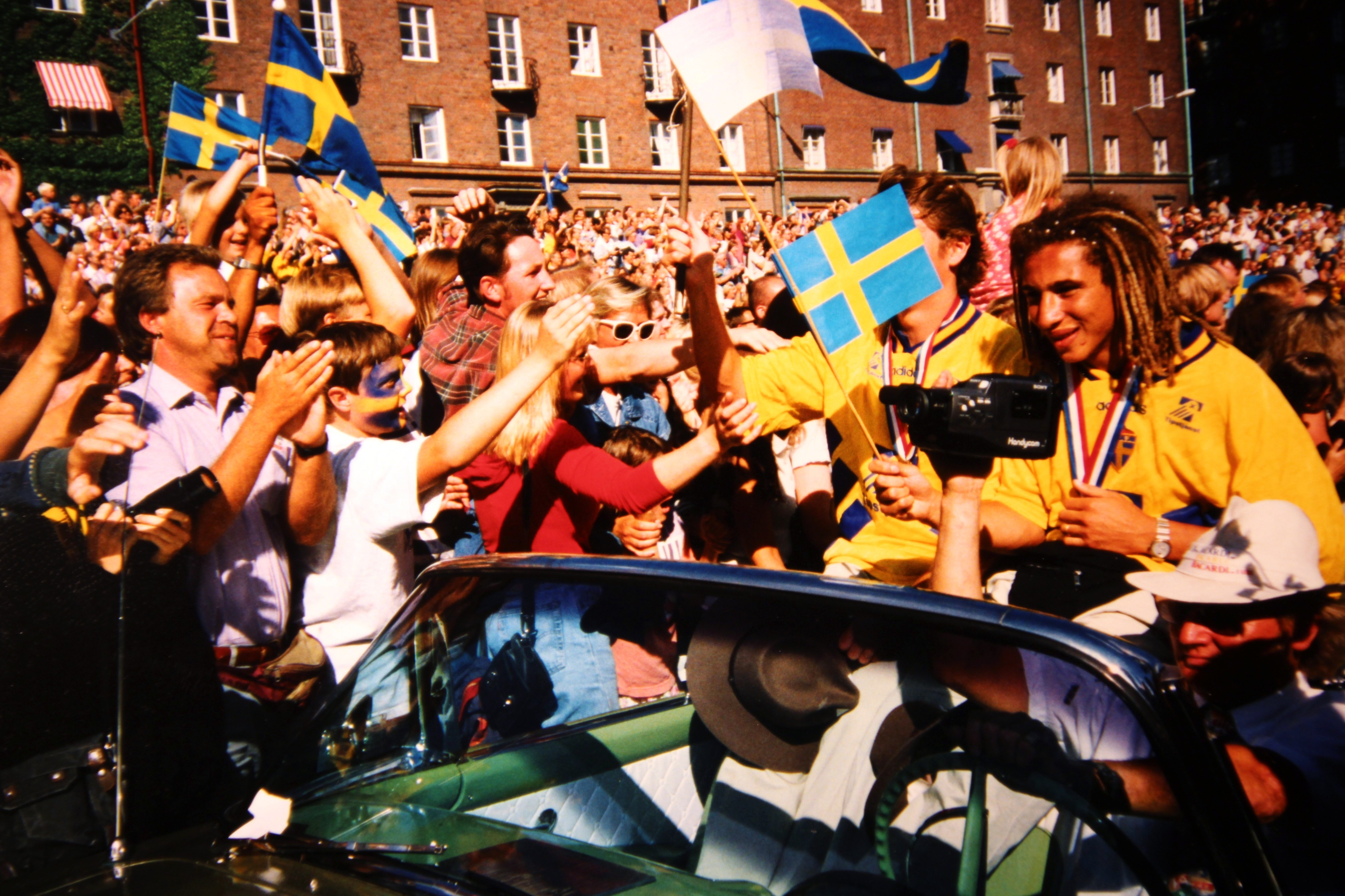 Svenska herrlandslaget i fotboll, hemkomst efter FIFA VM 1994, firande den 18 juli 1994 i Stockholm, Norr Mälarstrand